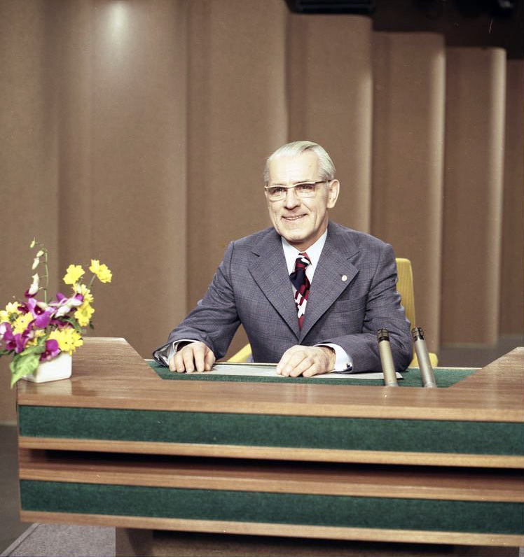 ADN-ZB/Link/27.12.1974/Berlin: Neujahrsansprache des Vorsitzenden des Staatsrates der DDR, Willi Stoph, am 31.Dez. 1974 im Fernsehen der DDR.